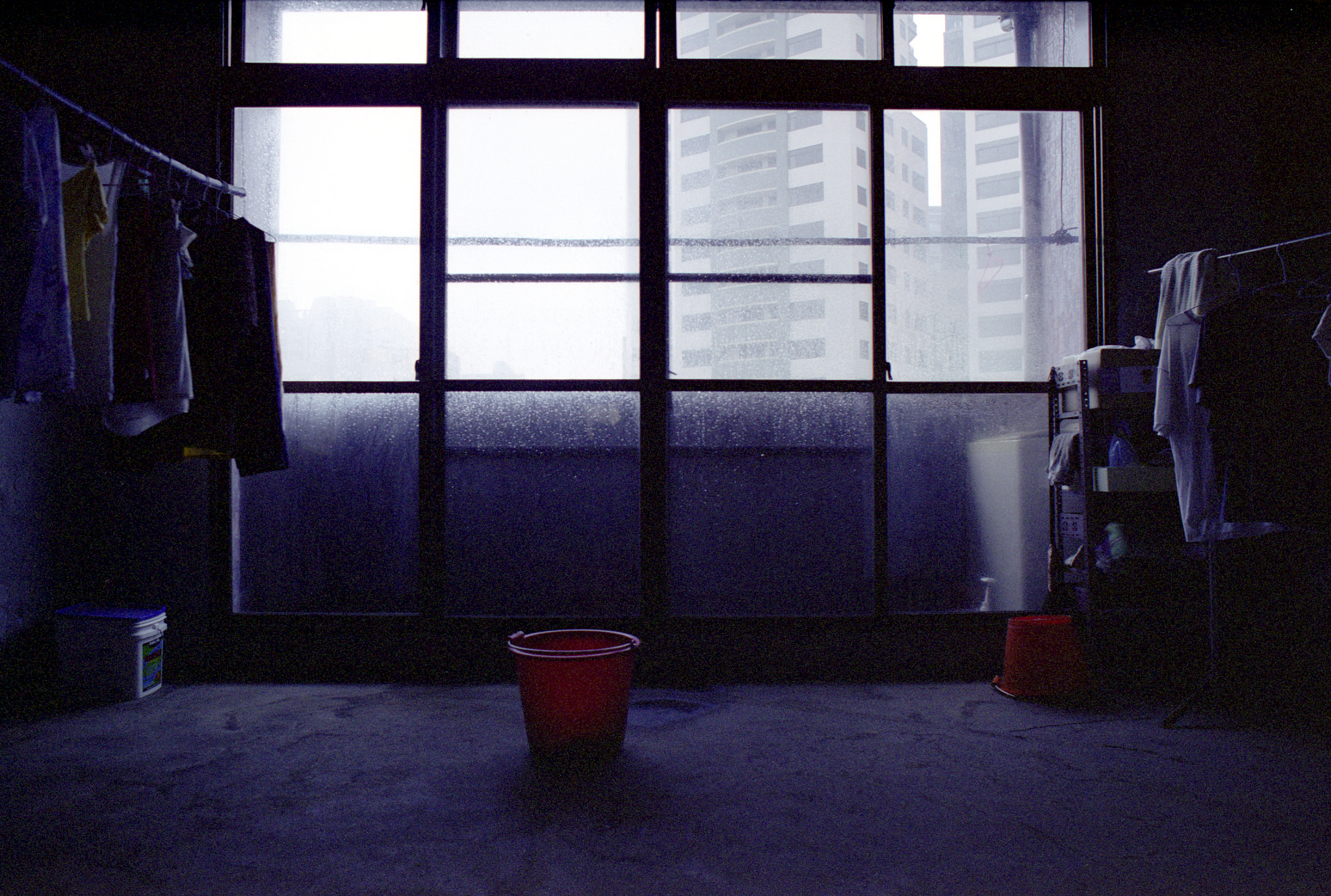 辛樂克颱風